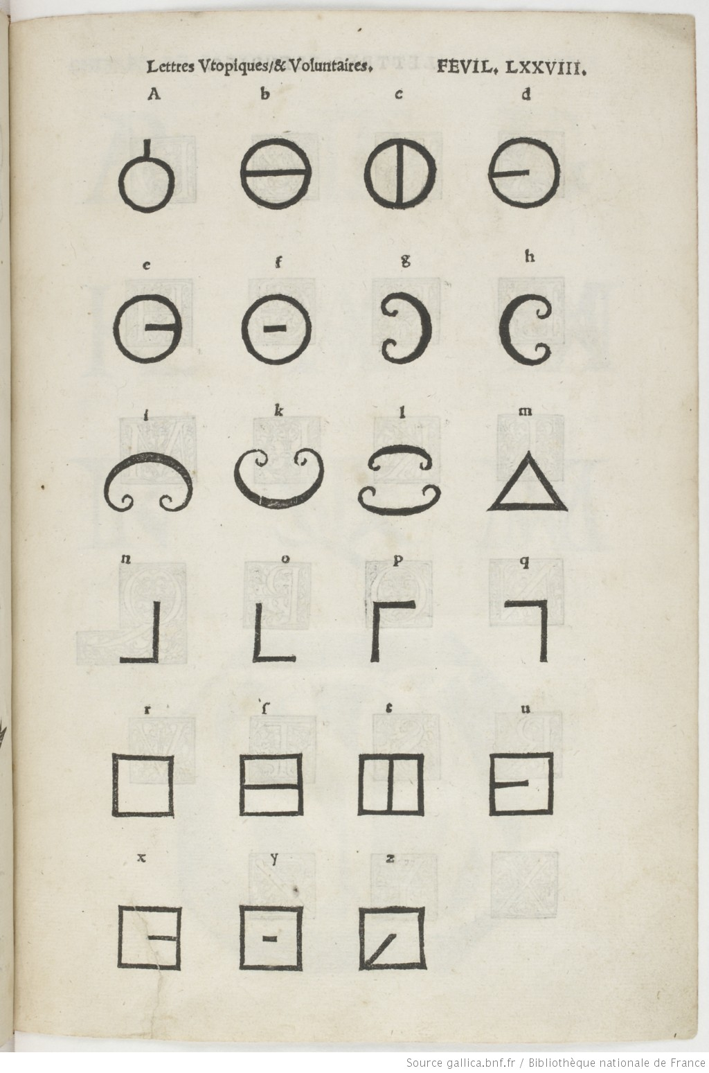 Page du Champ fleury de Geoffroy Tory où il a dessiné des « Lettres Utopiques & Voluntaires » en hommage à Thomas More et son Utopie